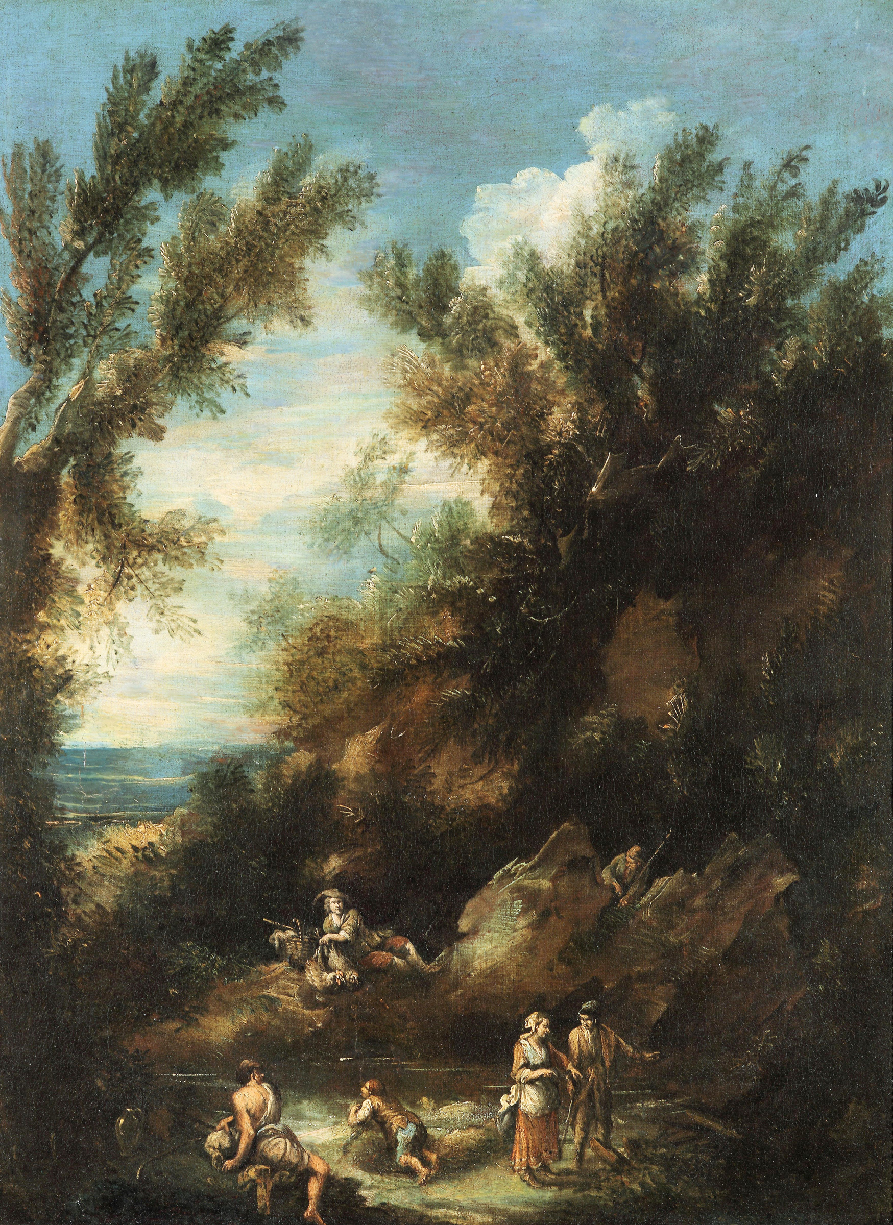 Landscape